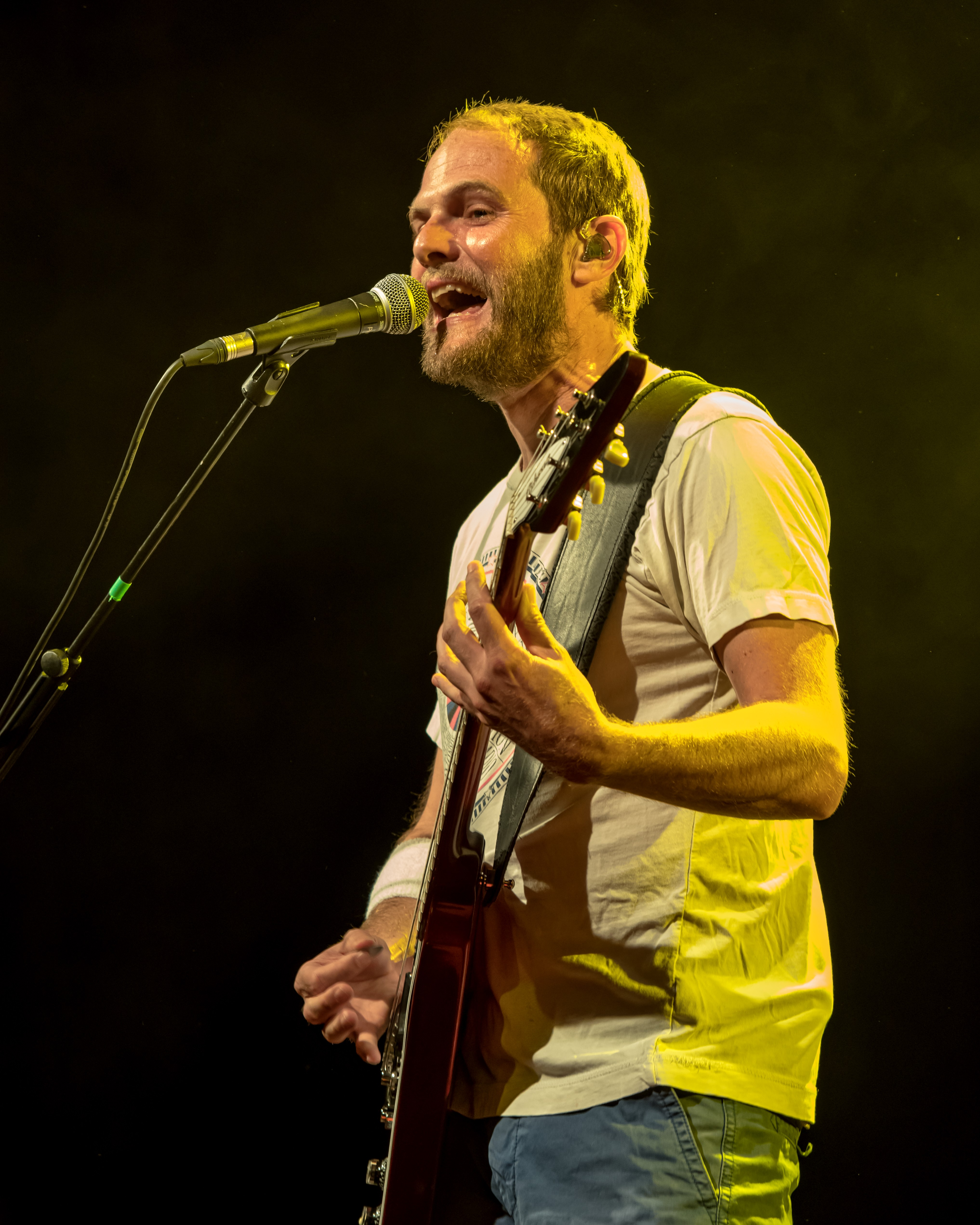 Bilder vom Zelt Musik Festival 2017 in Freiburg im Breisgau Sportfreunde Stiller am 18.07.2017